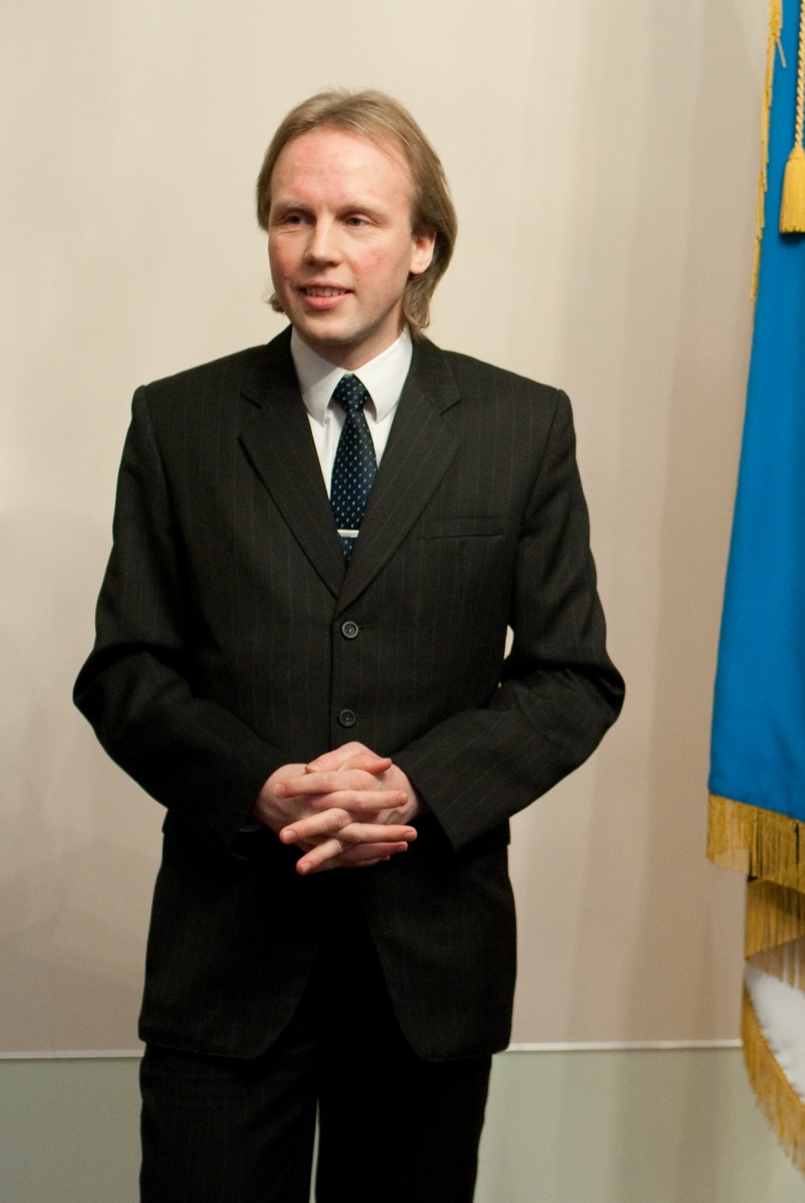 Peeter Laud võtmas vastu Noore teadlase preemiat.